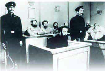 Бейлис на суде Beilis in court